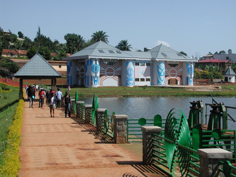 Pont du plaisir pres du lac municipal et de l'Alliance franco-camerounaise de Dschang